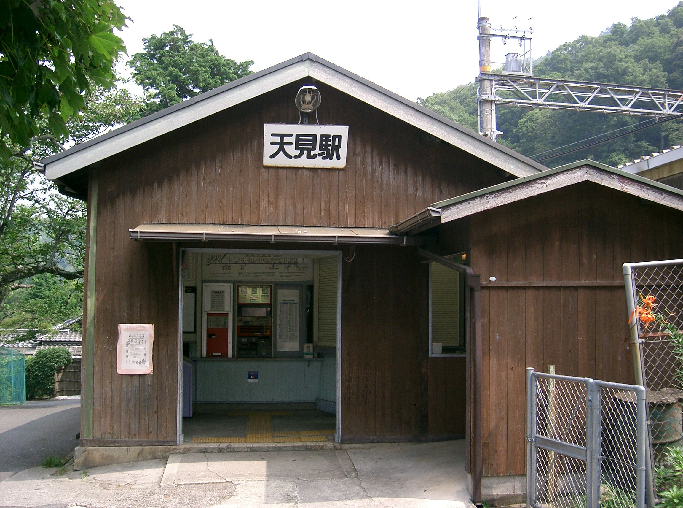 天見駅